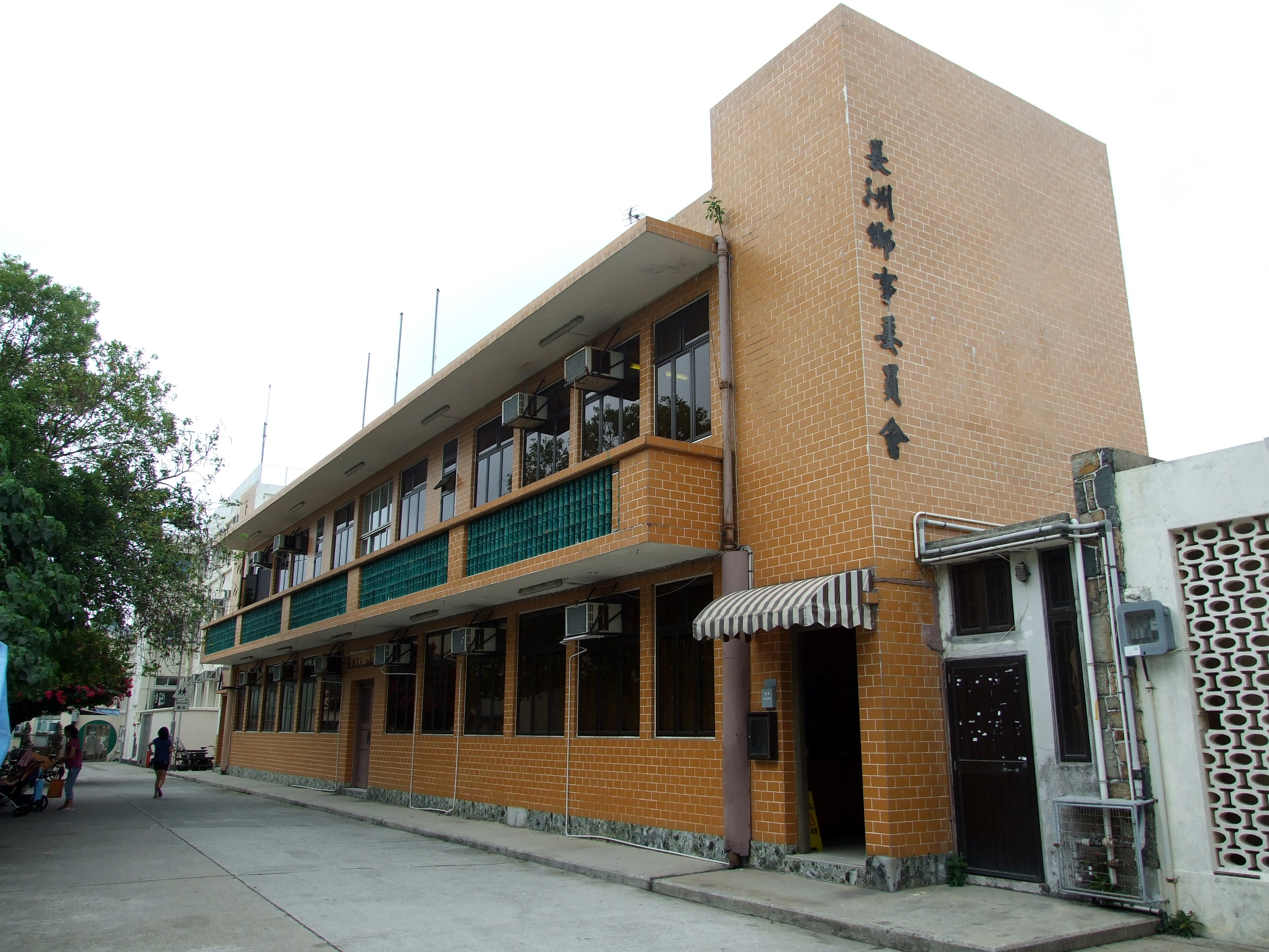 中文（香港）: 長洲鄉事委員會